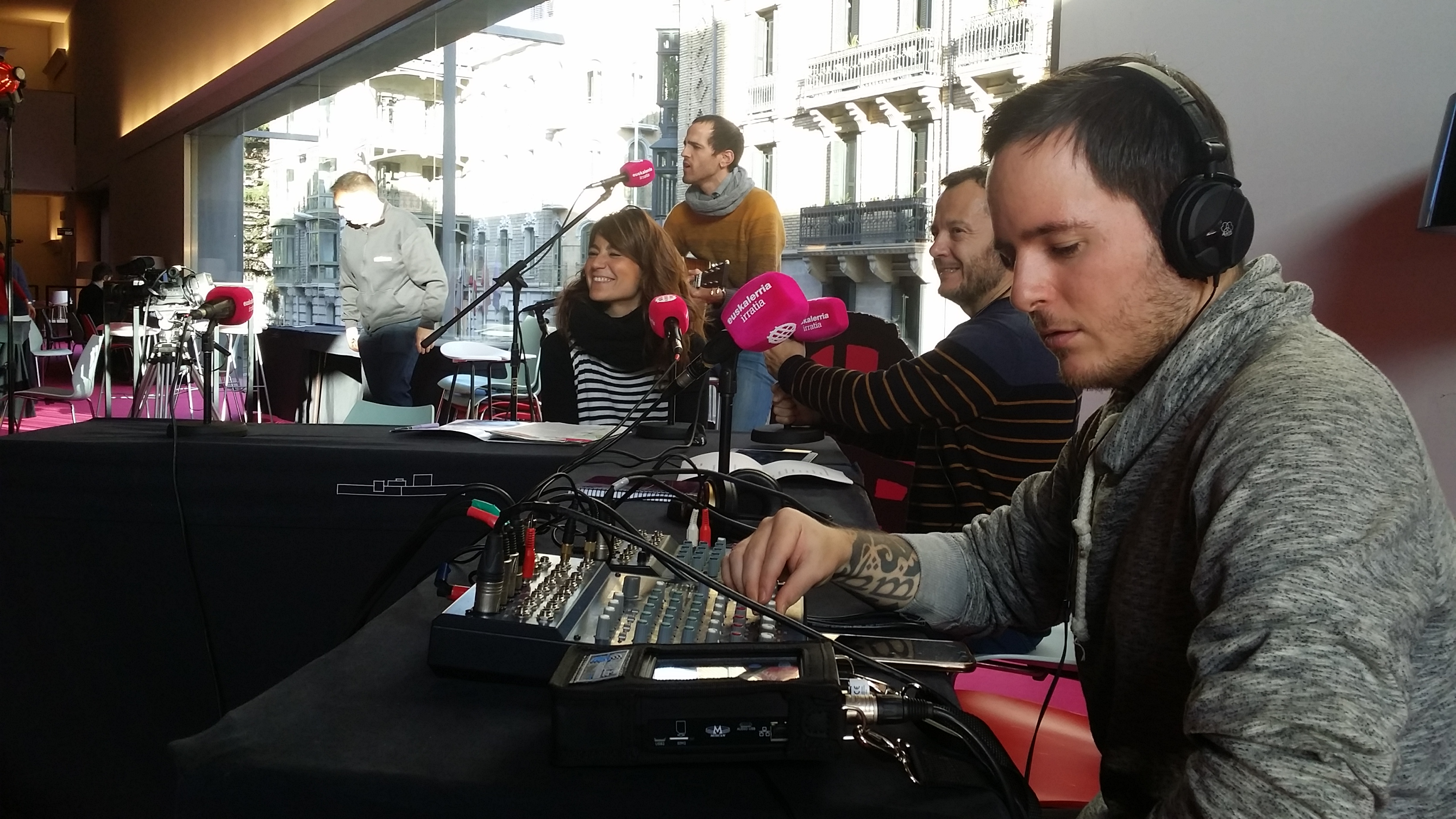 Euskalerria irratikoak zuzenean 948 Merkatutik, Baluarten, 2017ko azaroaren 16an.